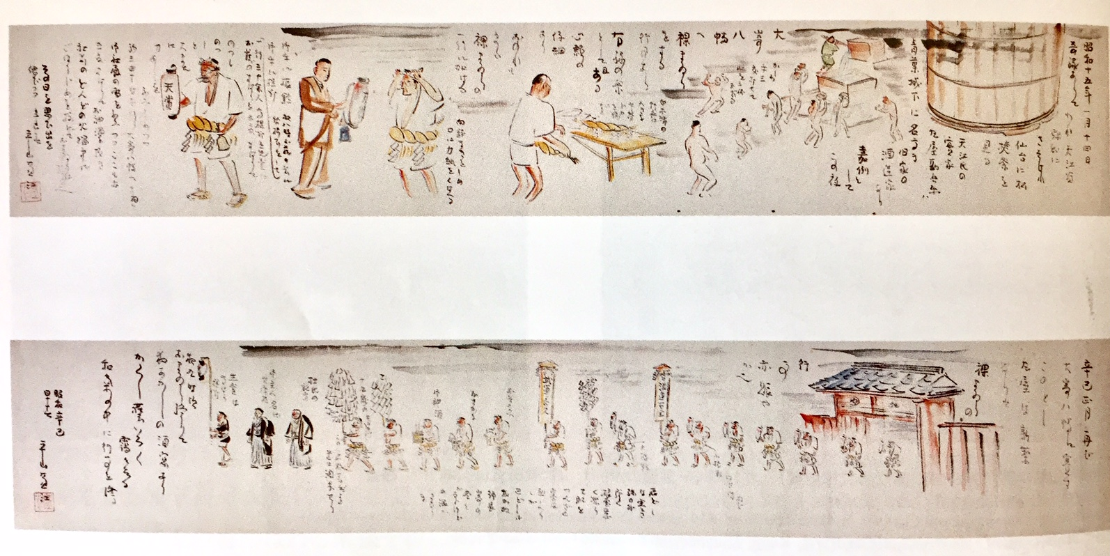 平山蘆江による「天賞酒造裸参り絵巻」